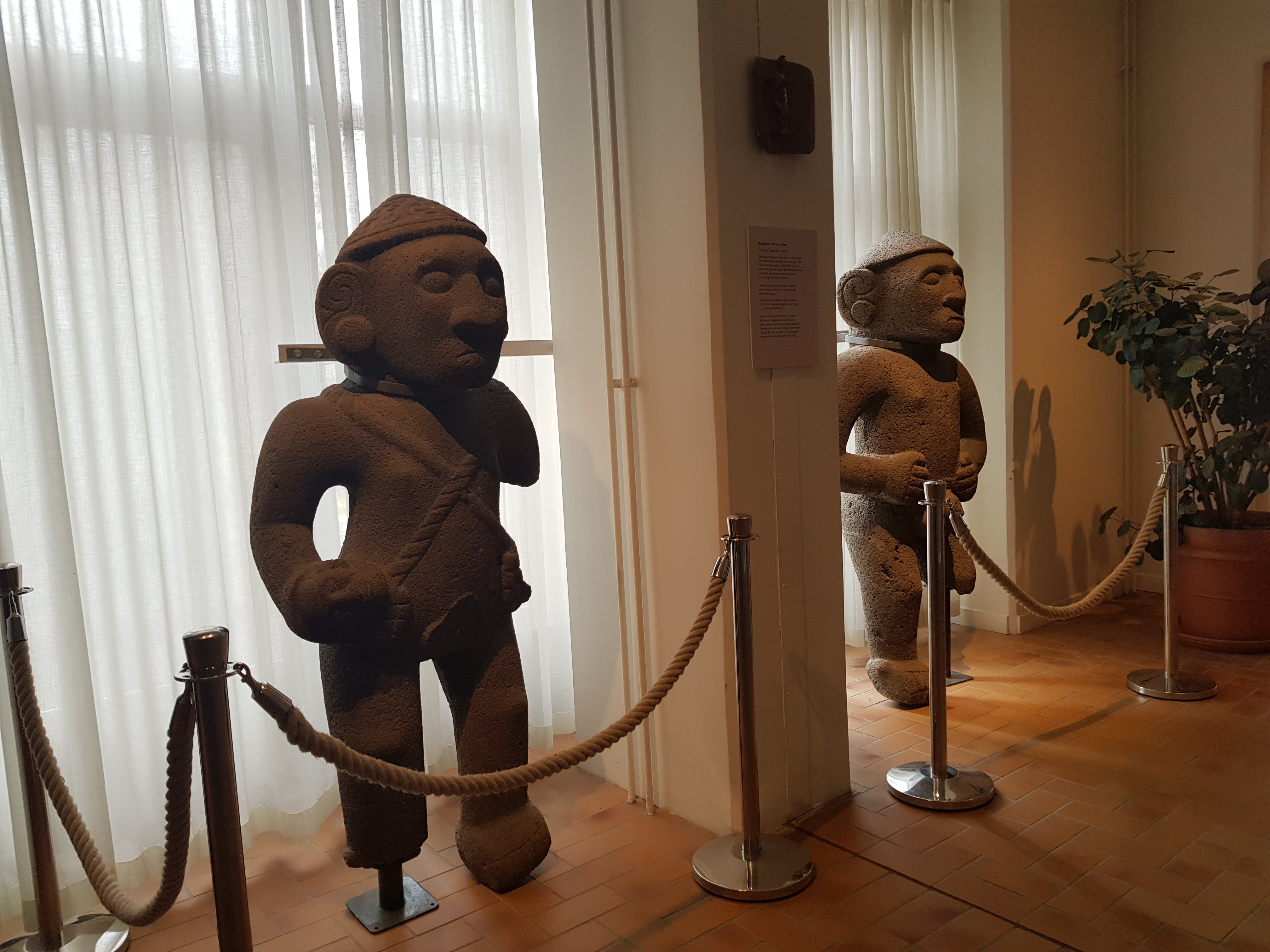 Två stenfigurer från Costa Rica vilka Carl Vilhelm Hartman grävde fram 1896 vid Las Mercedes. Här står de i entrén till Etnografiska museet, Stockholm. This is a photo of an artwork at the Museum of Ethnography in Sweden with the identifier: 1900.03.0611 This is a photo of an artwork at the Museum of Ethnography in Sweden with the identifier: 1900.03.0612